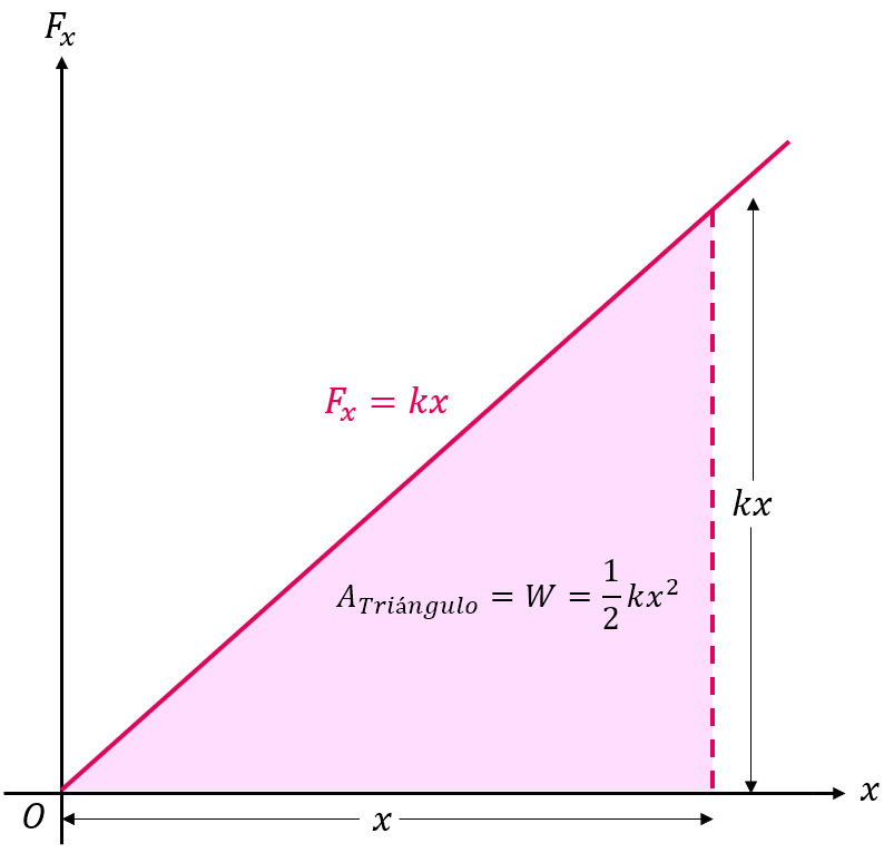 Gráfica que ilustra el trabajo asociado a la fuerza elástica, en función de la posición "x". El área encerrada bajo la recta se corresponde con el trabajo realizado, que se calcula con la expresión escrita en la imagen.